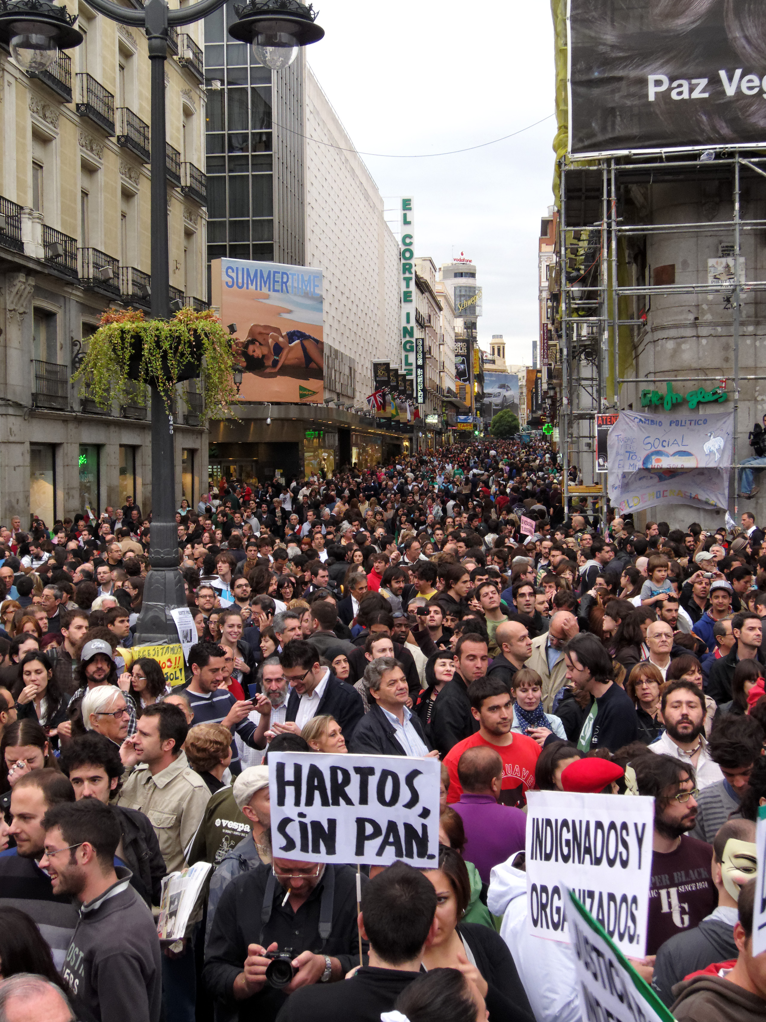 Manifestantes arribando a la concentración de Democracia Real Ya por la calle Preciados. Puerta del Sol, Madrid, España.